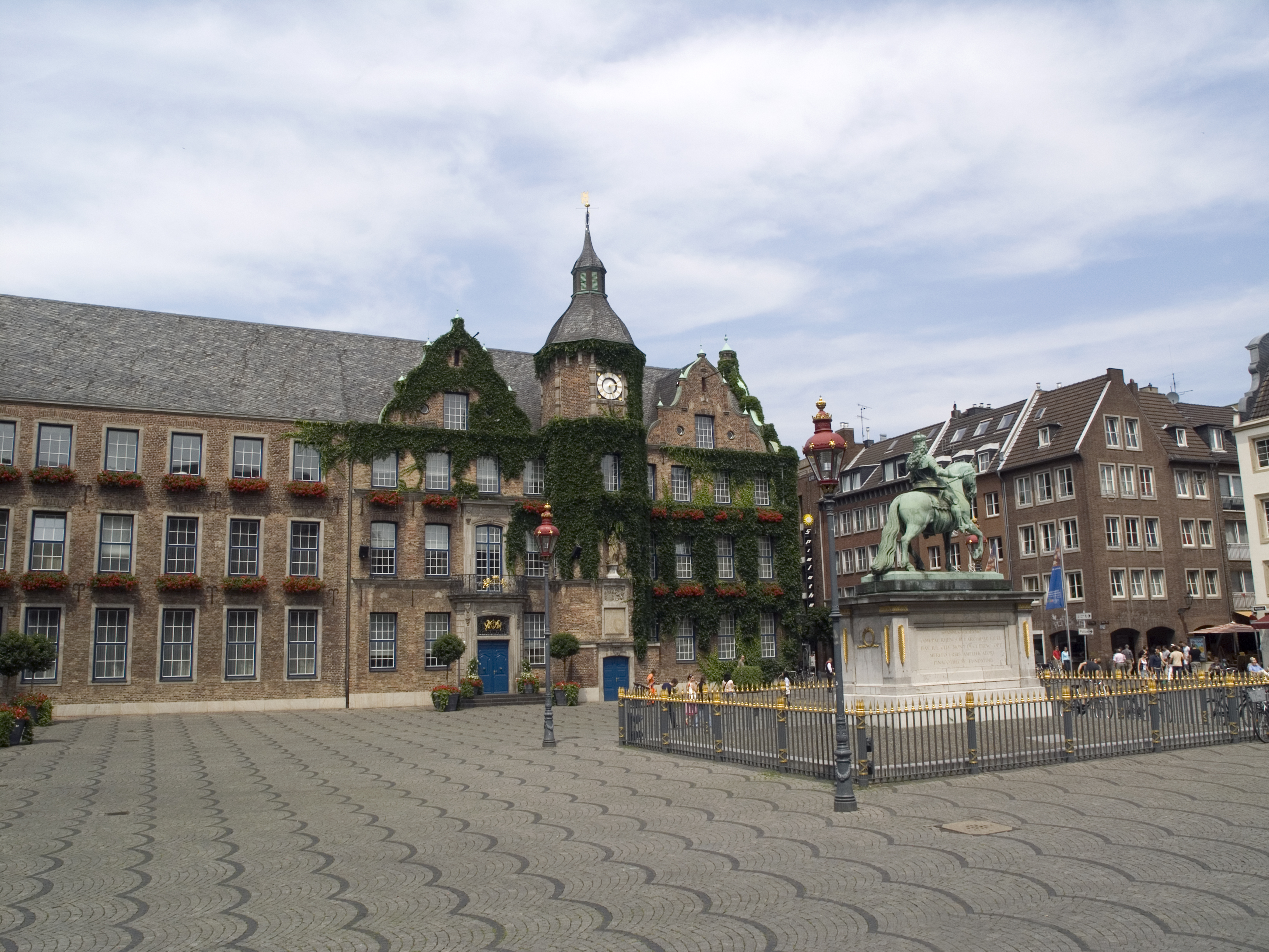 Северный Рейн-Вестфалия, Дюссельдорф. Площадь Марктплац